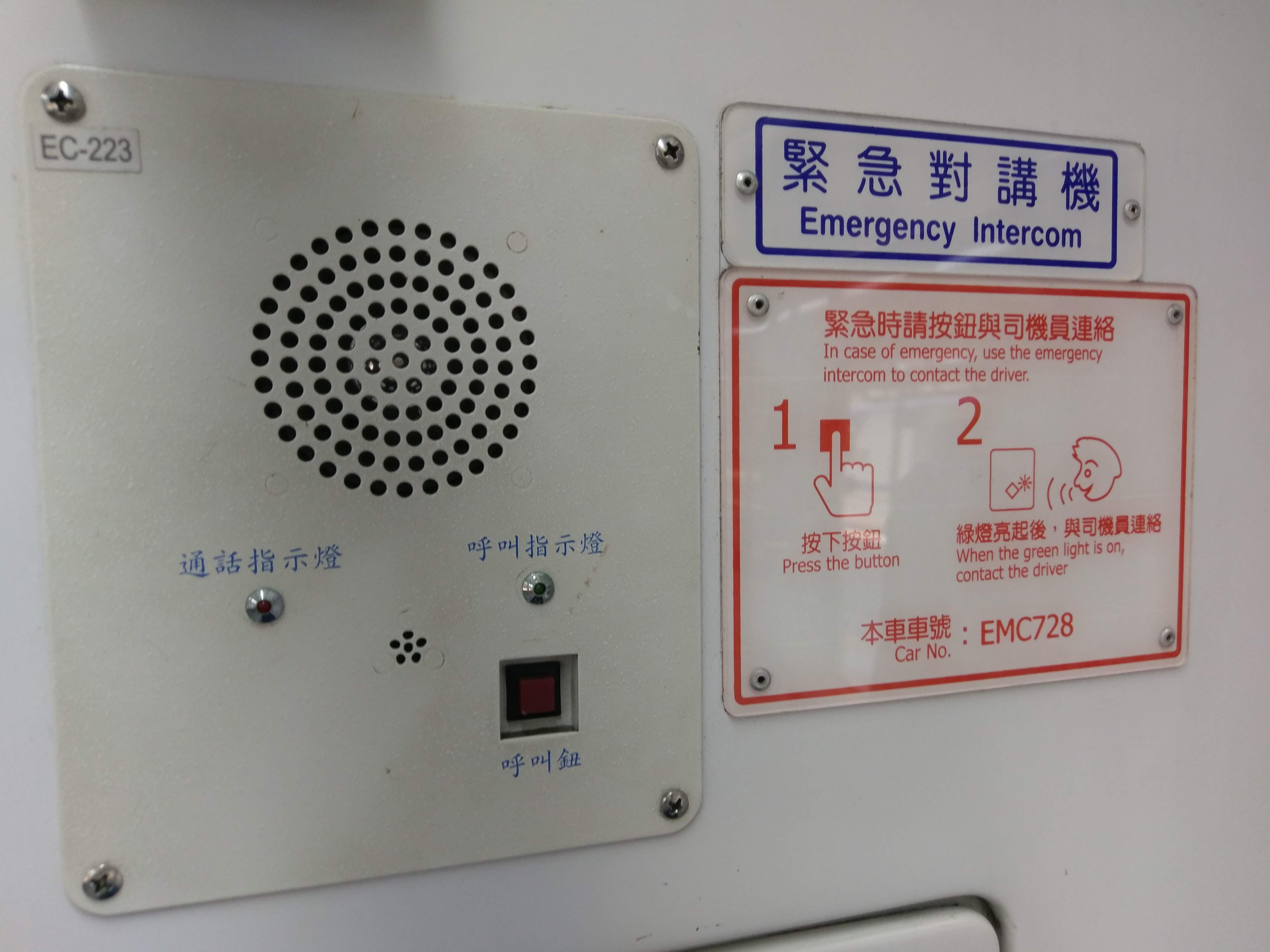 中文（台灣）: 台鐵EMU700型電聯車EMC728車內緊急對講機